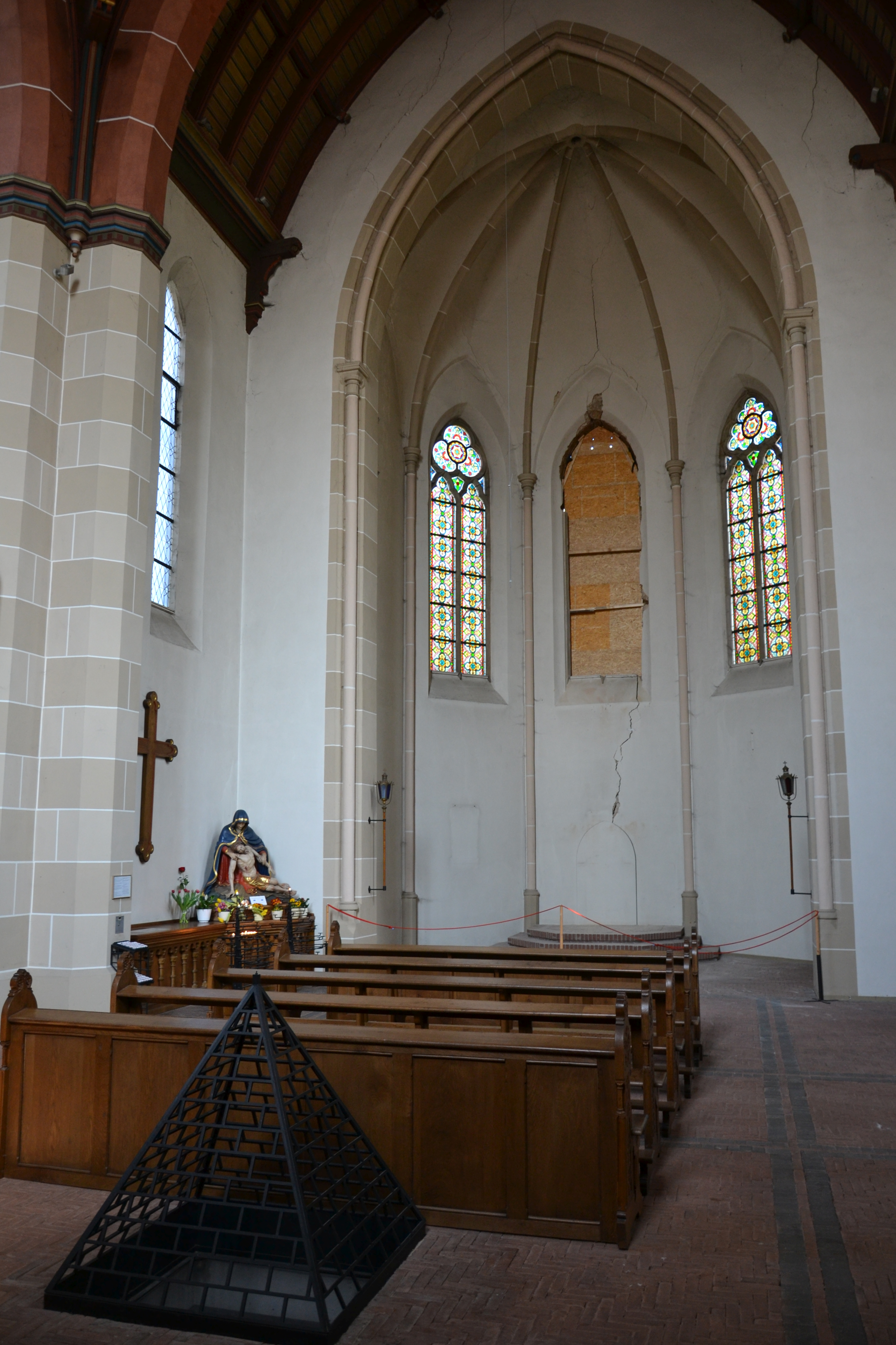 Katholische Kirche Westkorso Kurspark Bad Oeynhausen